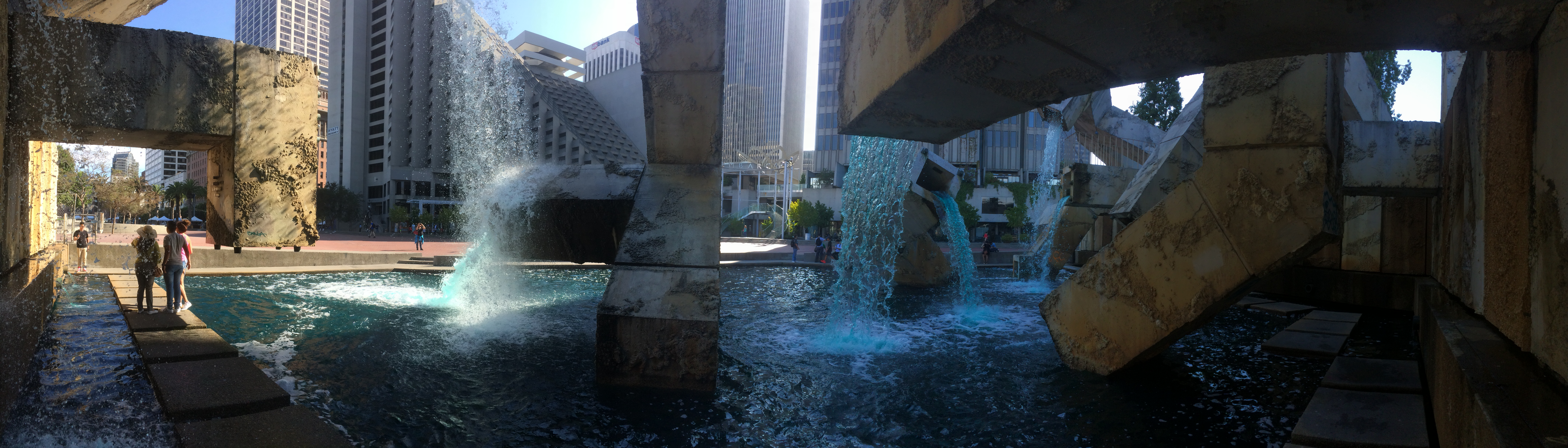 San Francisco